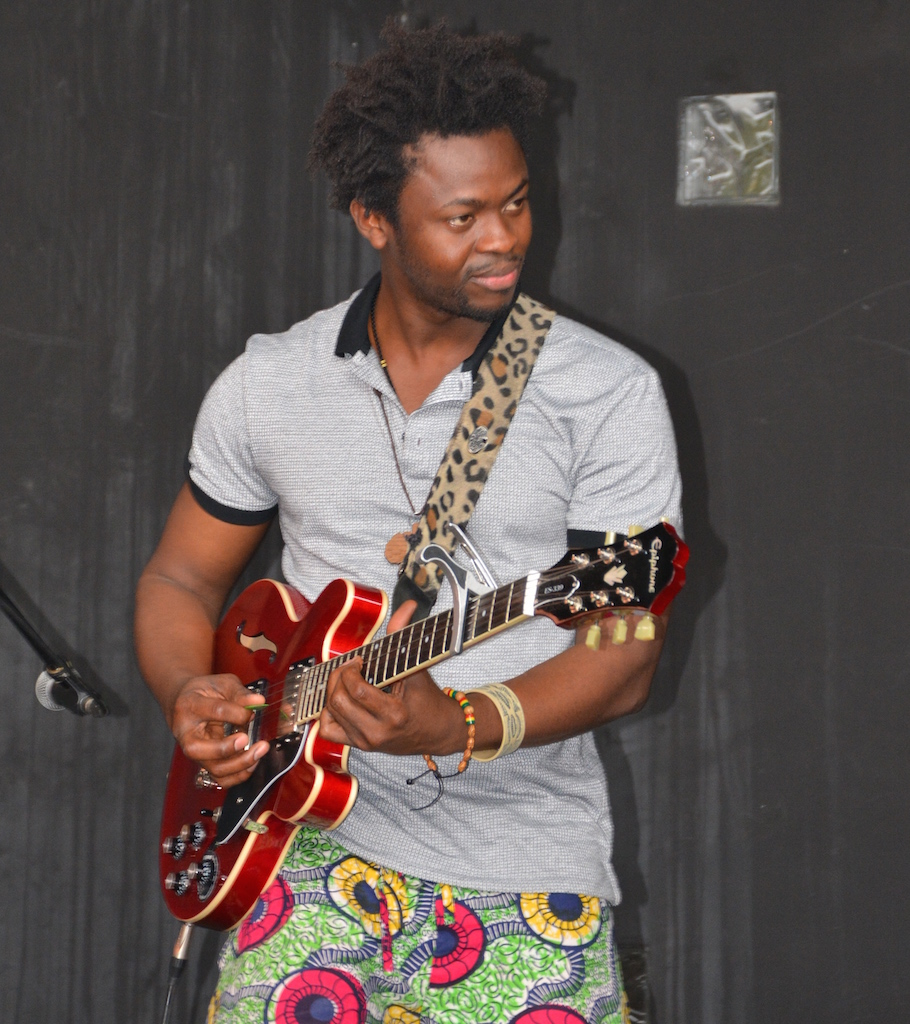 Moh! Kouyaté en création à Pointe Noire - Congo